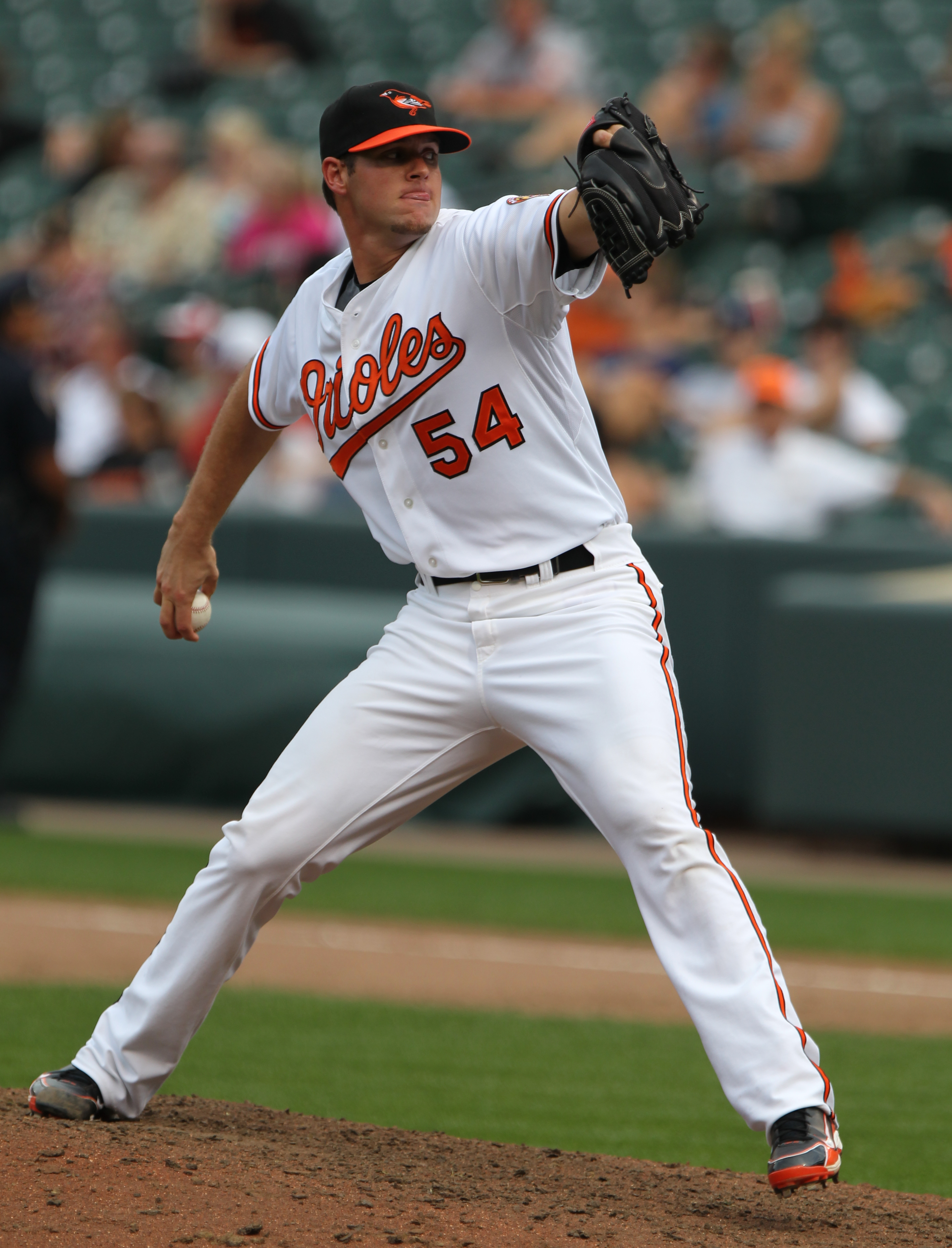 Rick VandenHurk